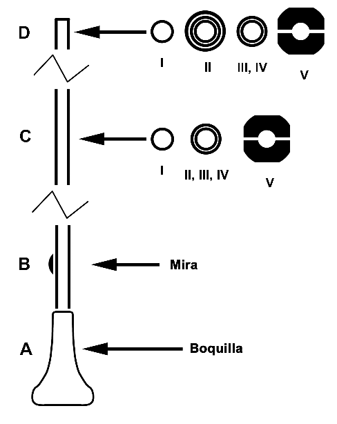 Estructura de una cerbatana idealizada donde se representa (dibujos C y D) la sección de cinco tipos de cerbatanas sudamericanas (Jens Yde 1958, p. 282-285); una boquilla (dibujo A) labrada de diferentes maderas y formas; y una mira (dibujo B) que ayuda a apuntar el arma, generalmen construida con dientes de roedores.